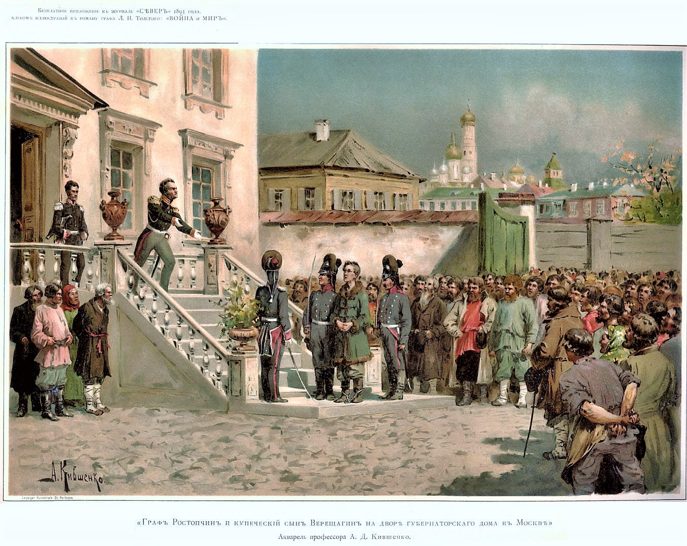 Это акварель работы русского художника Алексея Кившенко: «Граф Ростопчин и купеческий сын Верещагин на дворе губернаторского дома в Москве». Иллюстрация к роману Льва Толстого «Война и Мир»